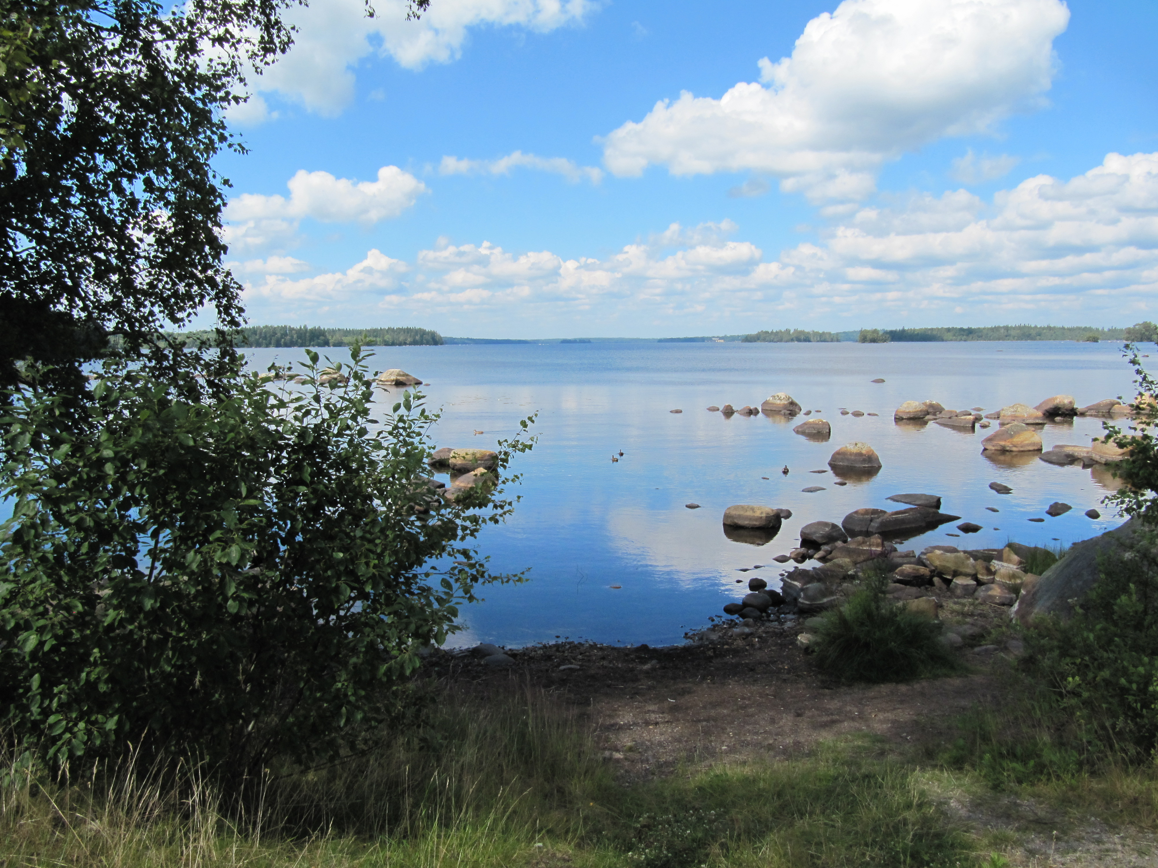 Innarens sydöstra del vid Riksväg 23/37